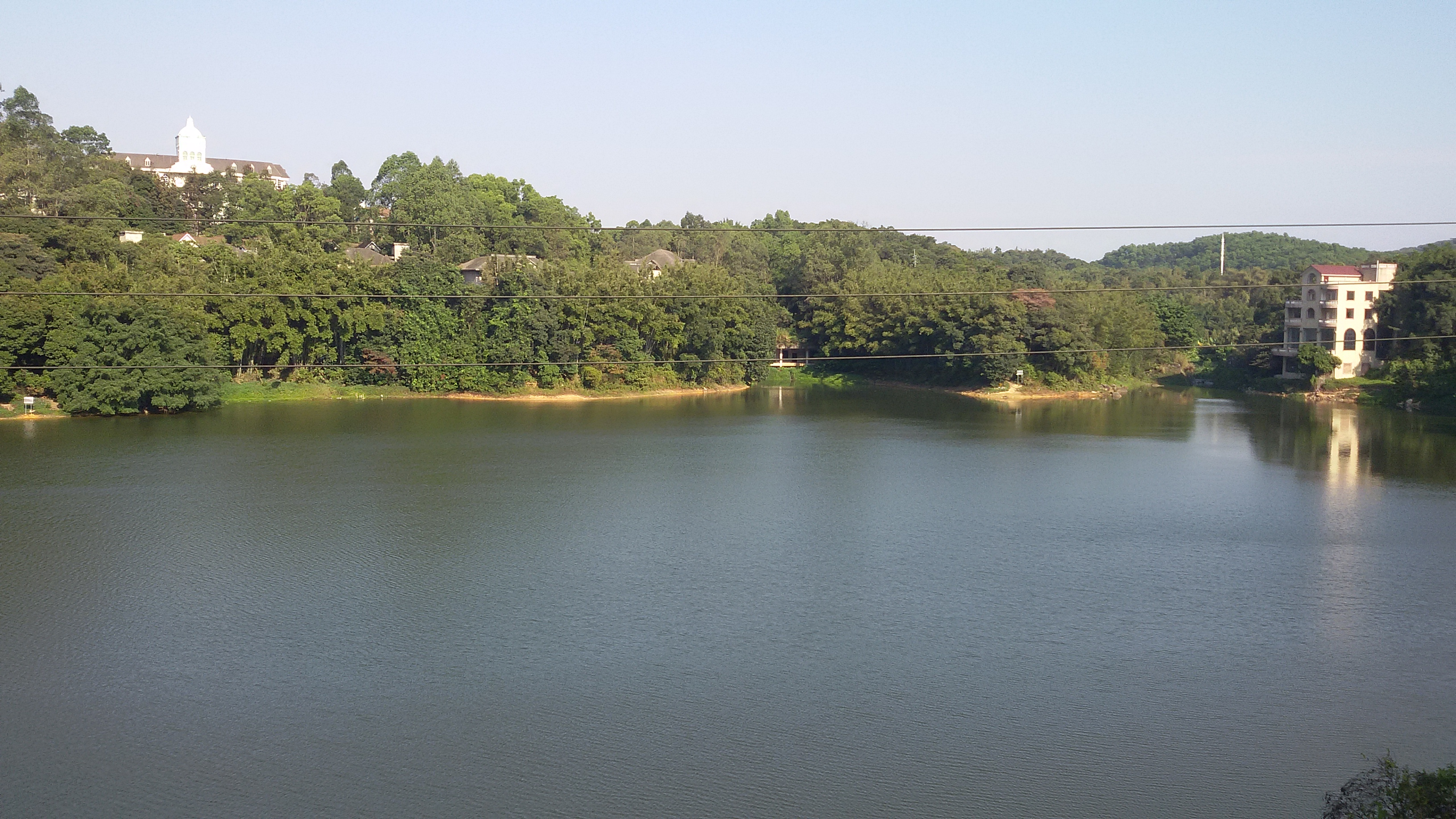 粵語: 天鹿湖水库